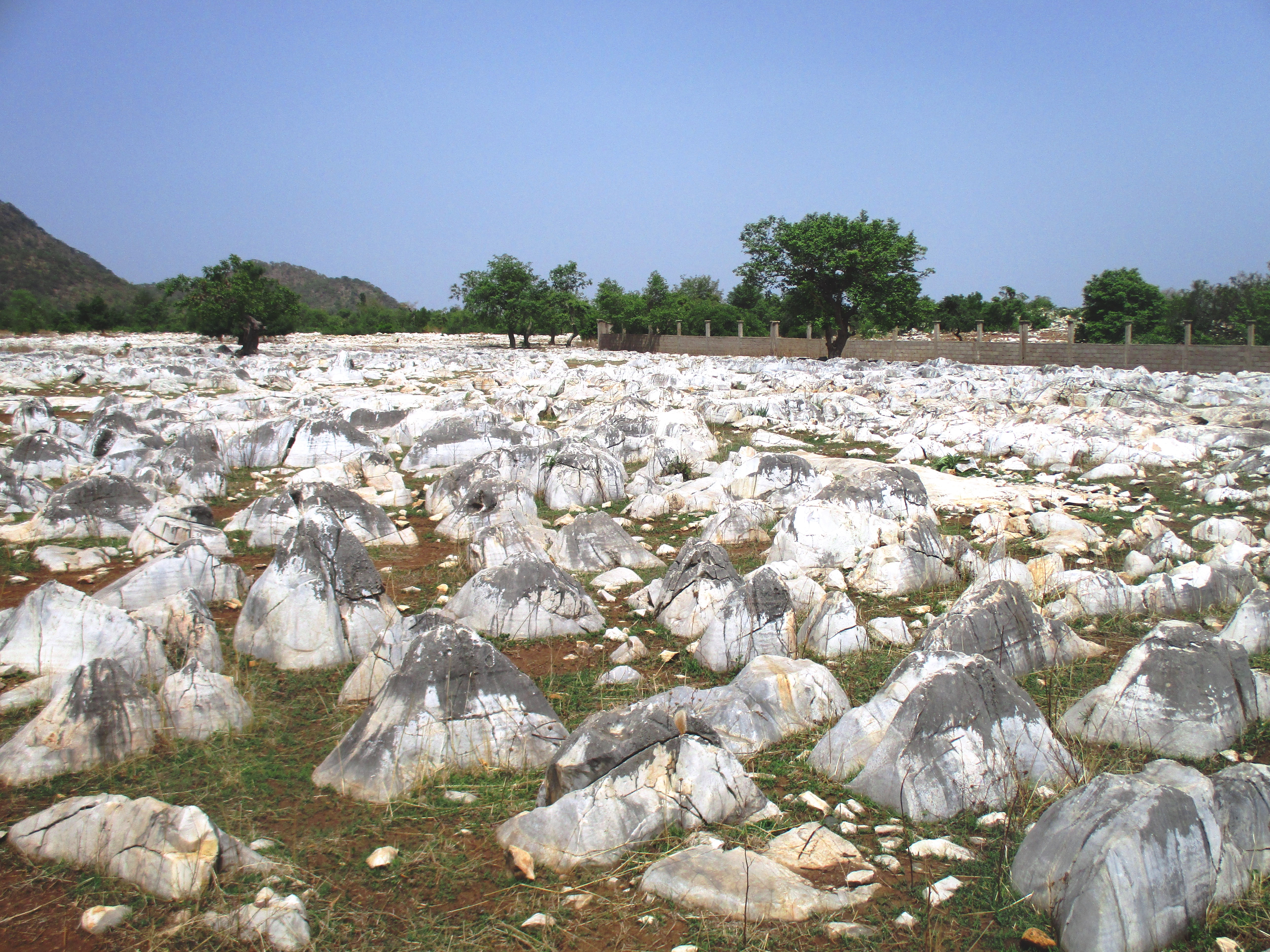 Les gravures rupestres du site archéologique de Bidzar, situées sur la route nationale numéro 1 entre Figuil et Maroua. Gravures ayant plusieurs siècles d'existences.